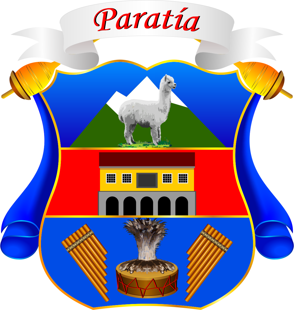 Escudo del Distrito de Paratía - Provincia de Lampa - Región Puno